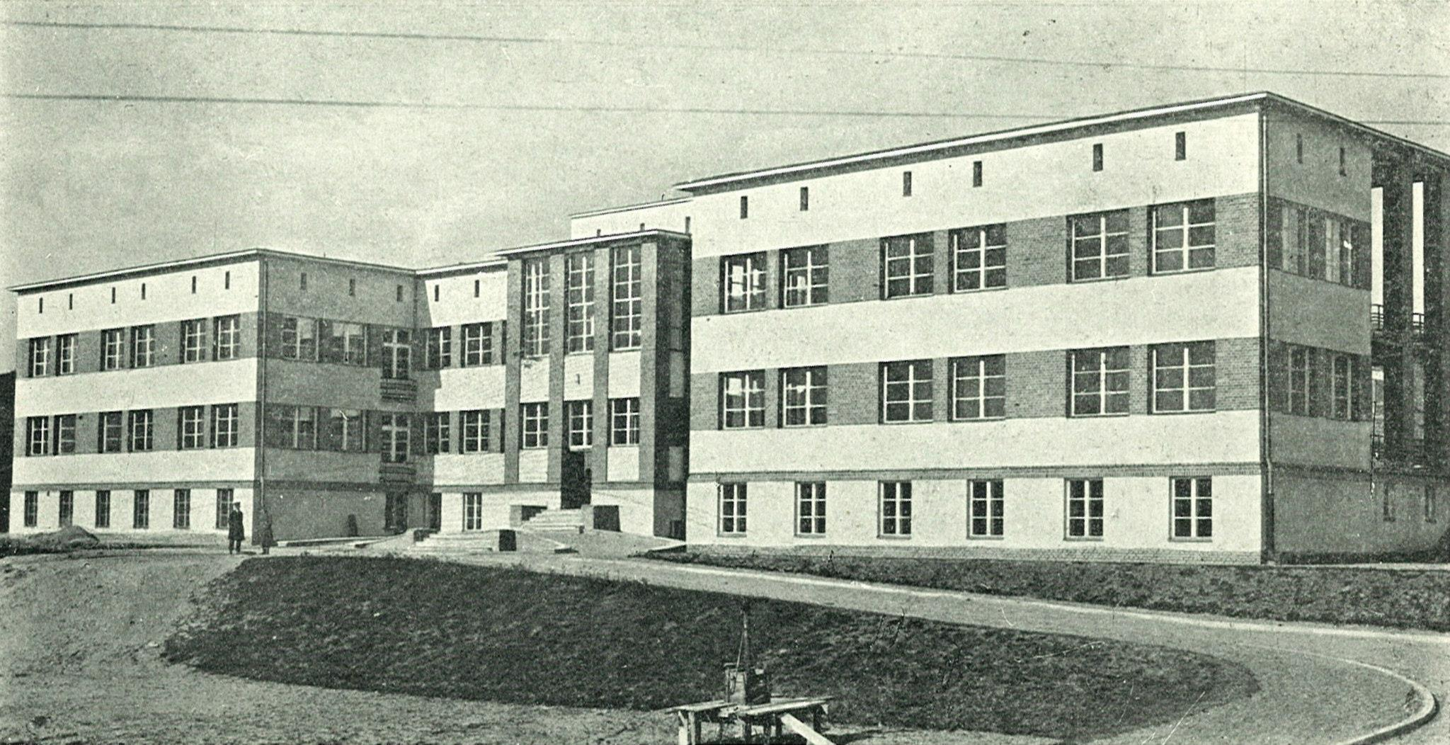 Шпиталь у Гдині в місцевості Оксивій. Архітектор Мар'ян Лялевич (1878—1944).